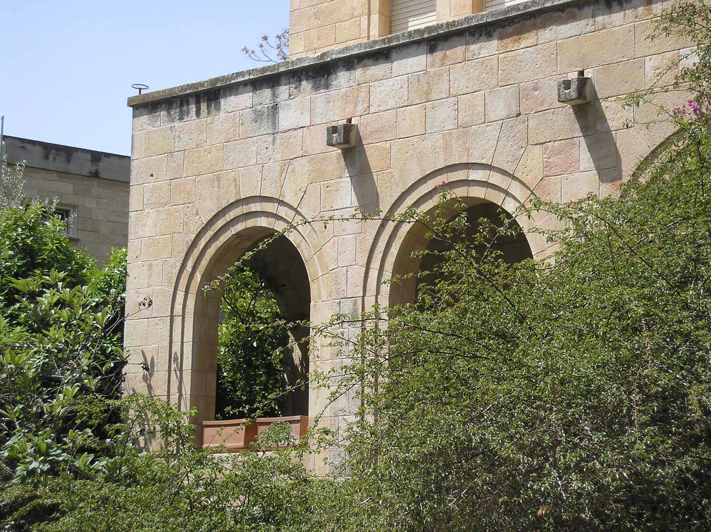 Beit Matossian, Talbiya, Jerusalem